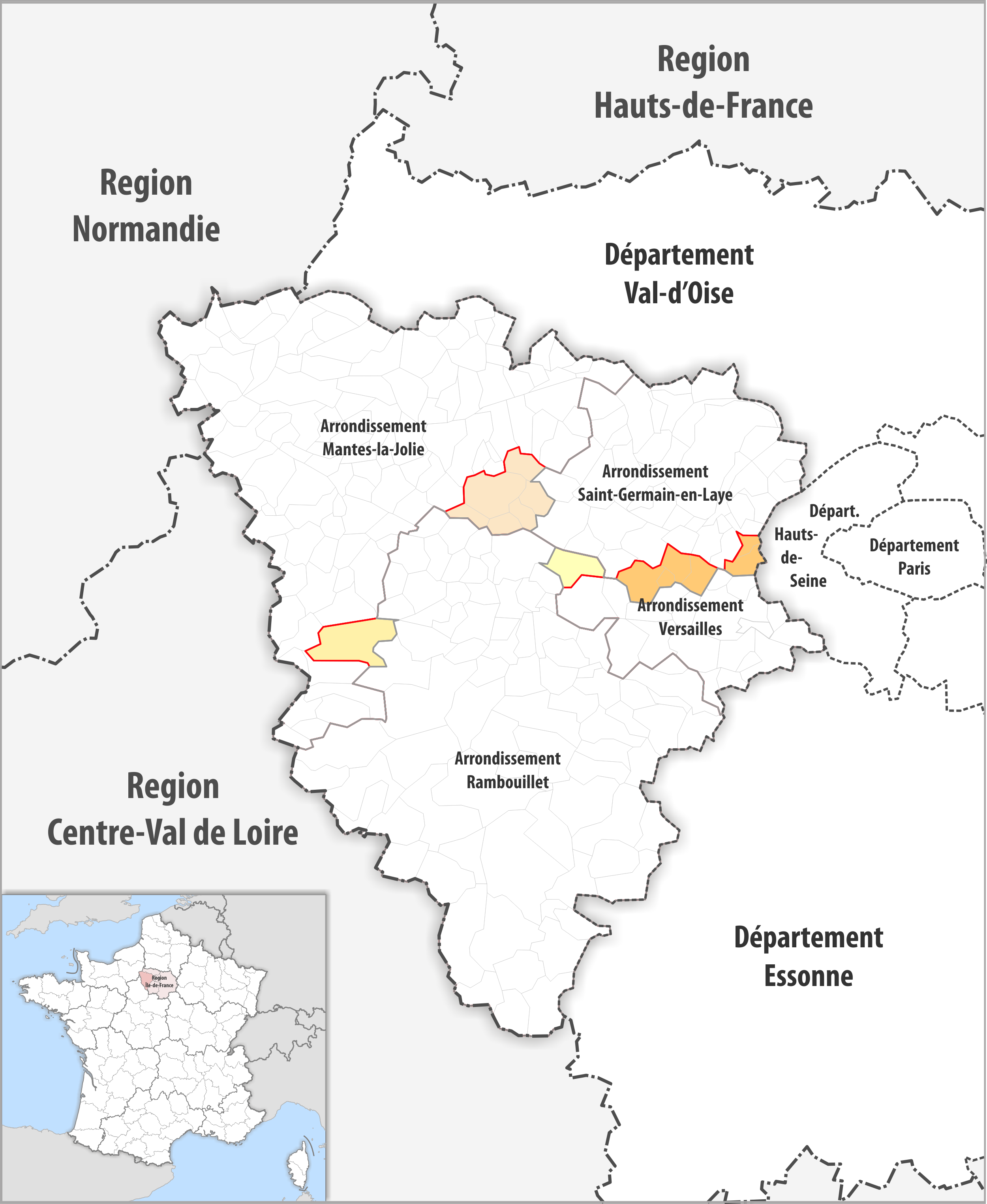 Arrondissements Anpassungen auf 2017 im Departement Yvelines